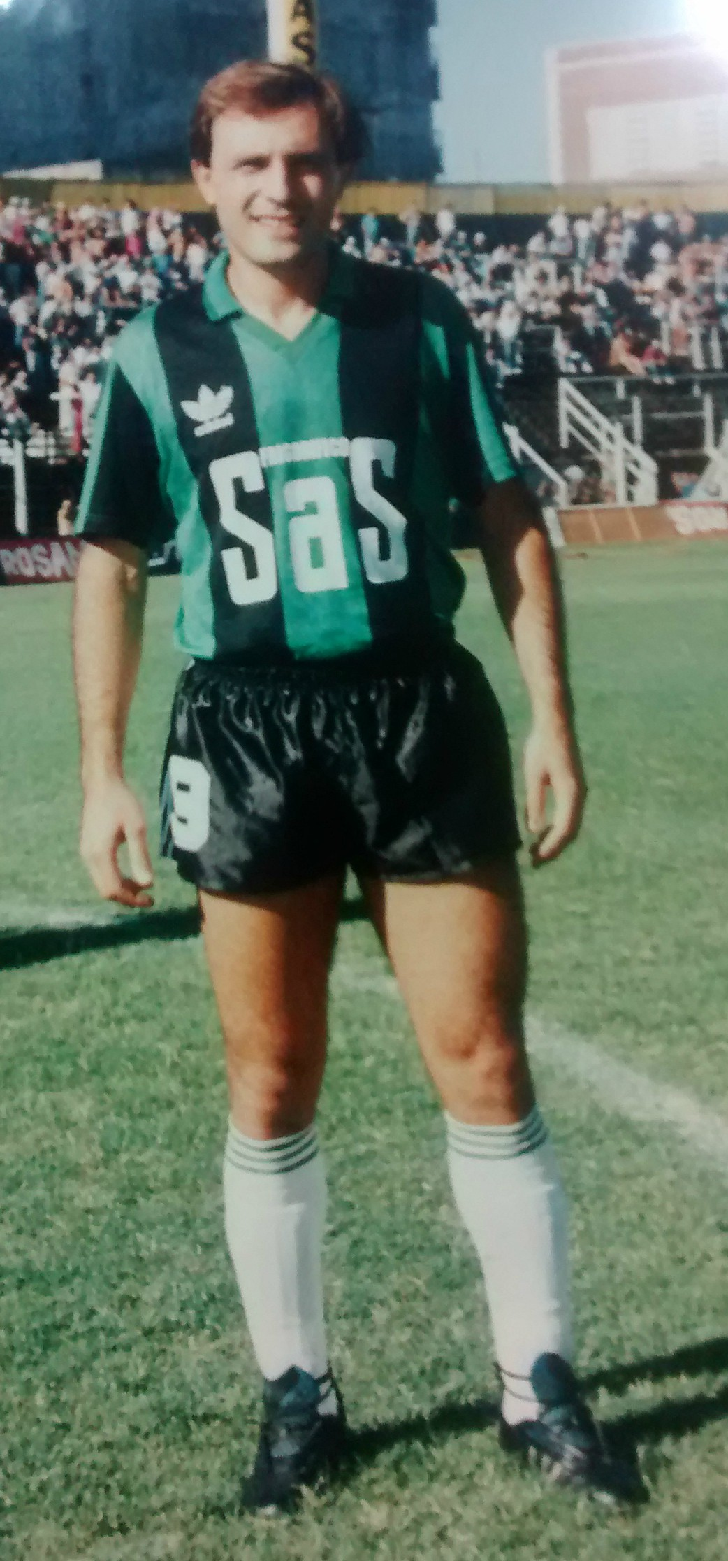 candella con la de chicago